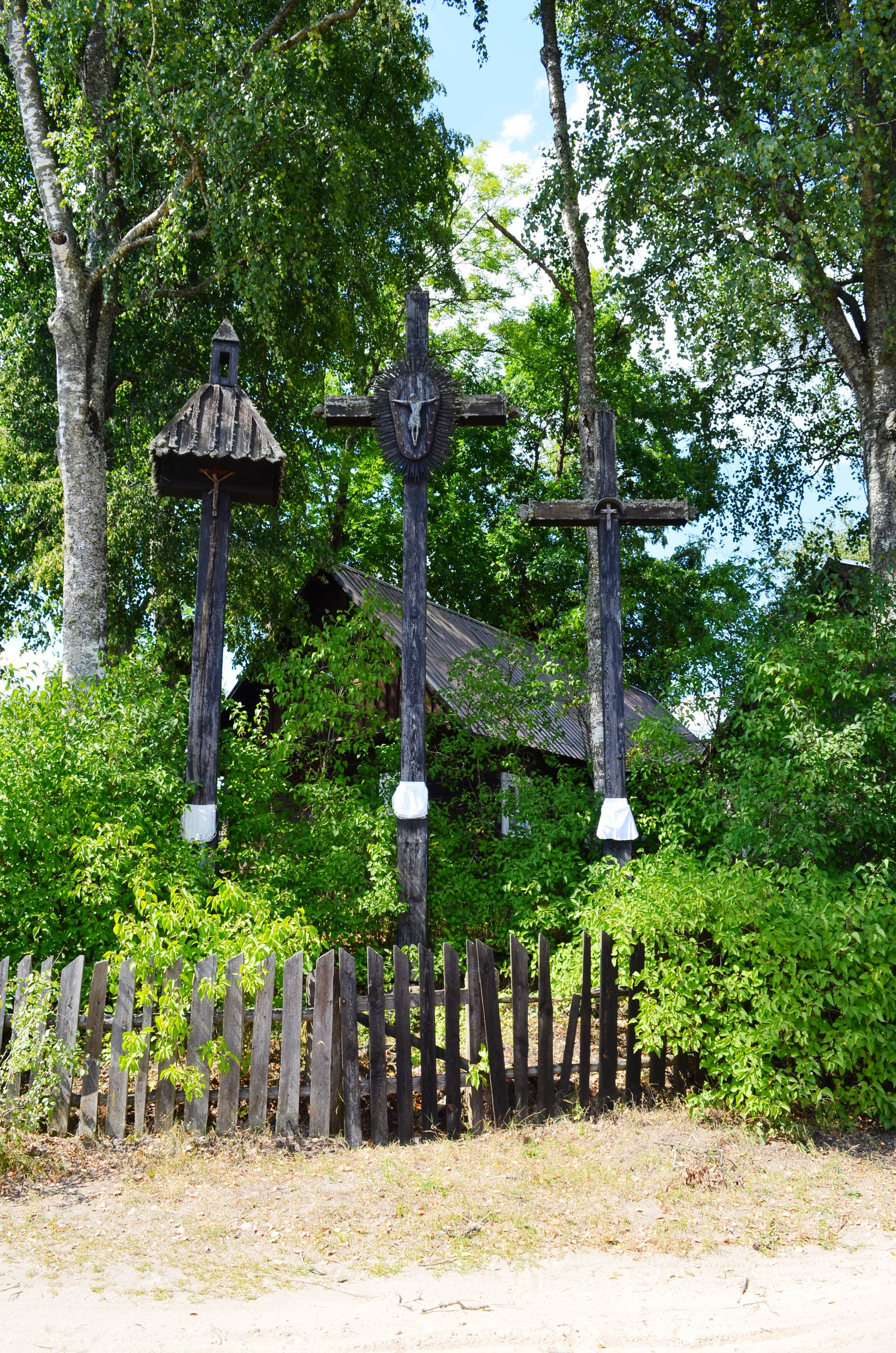 Trys dzūkiški kryžiai. Zervynos, Dzūkijos NP, Varėnos raj.